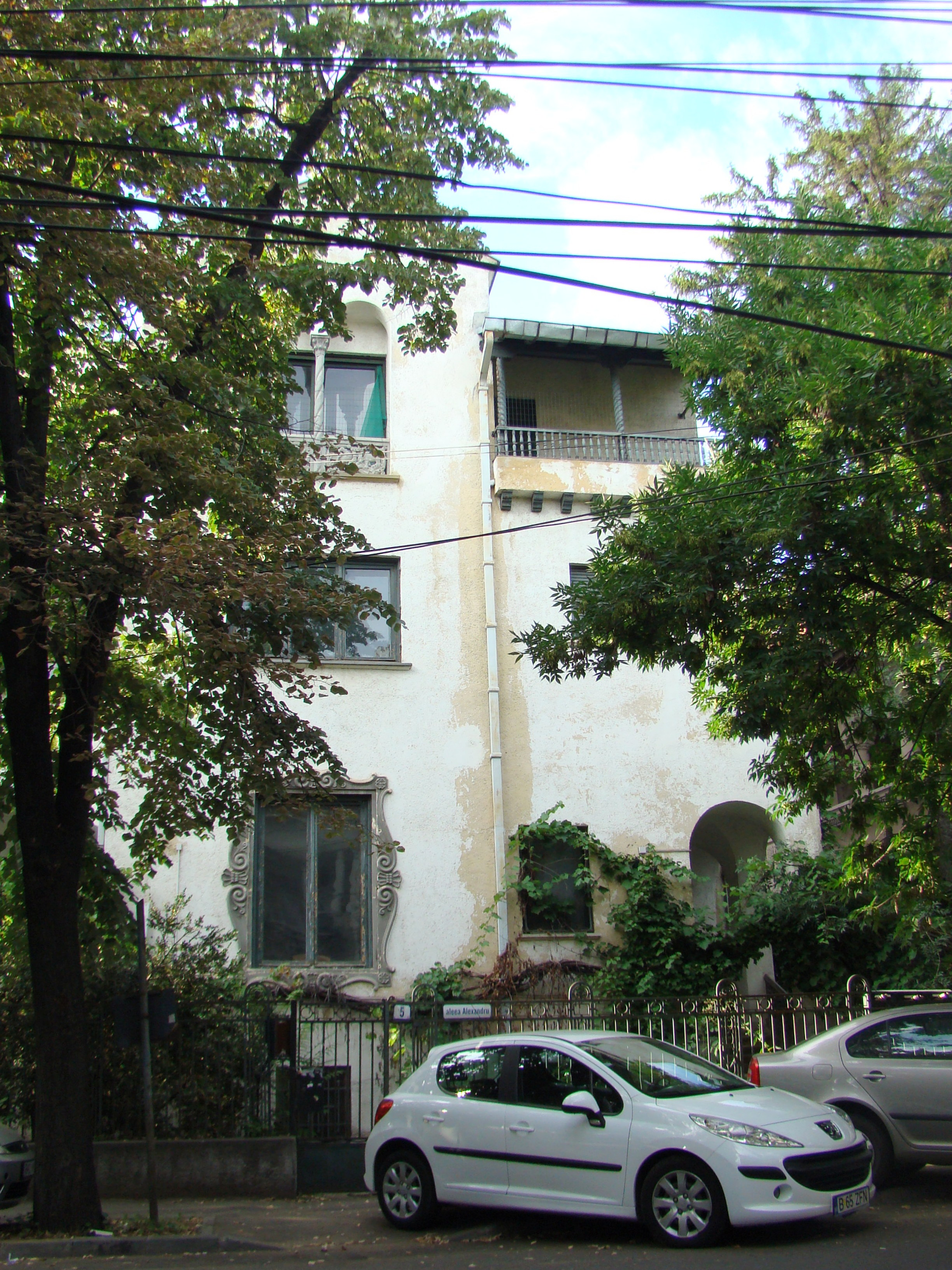 Casă monument istoric, str.Aleea Alexandru, nr.5